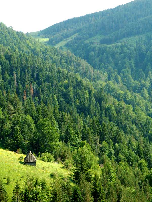 Српски (ћирилица): Четинарска шума у националном парку Тара